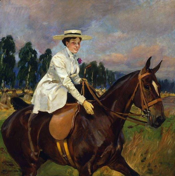 Portret konny Marii Zandbangowej